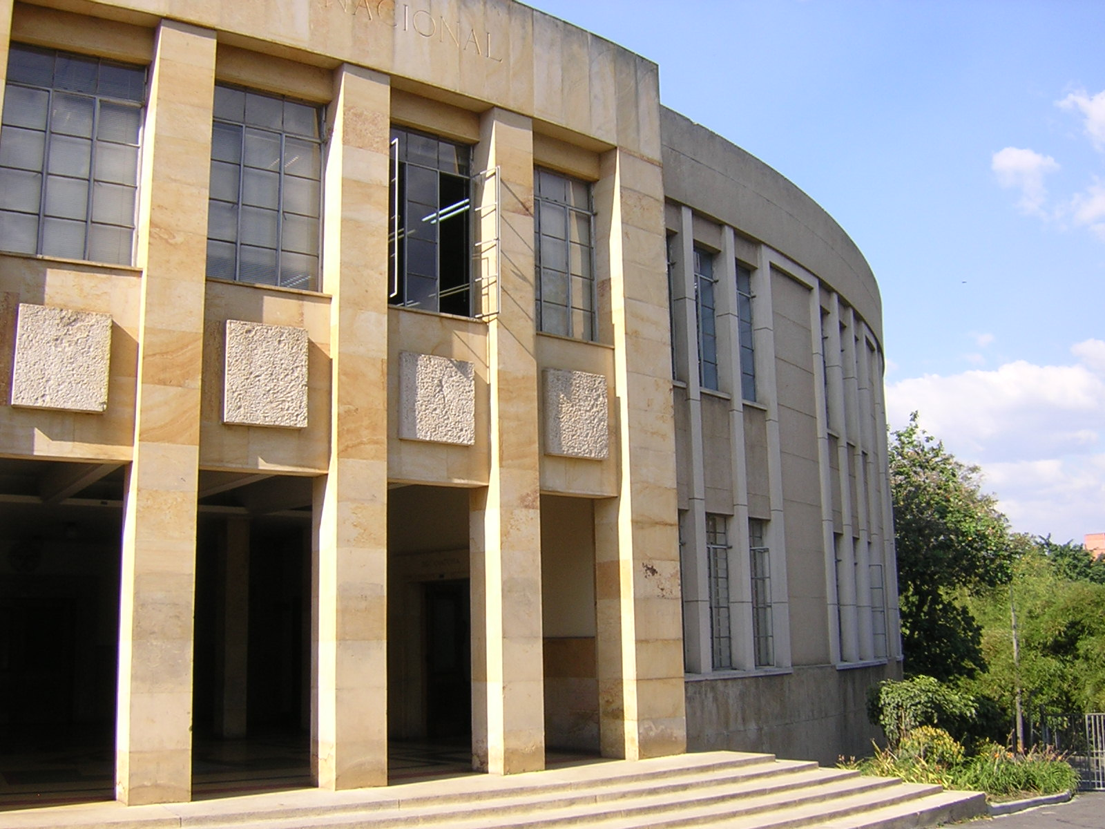 bloque M5, Facultad de Minas, Universidad Nacional de Colombia sede Medellín. Colombia